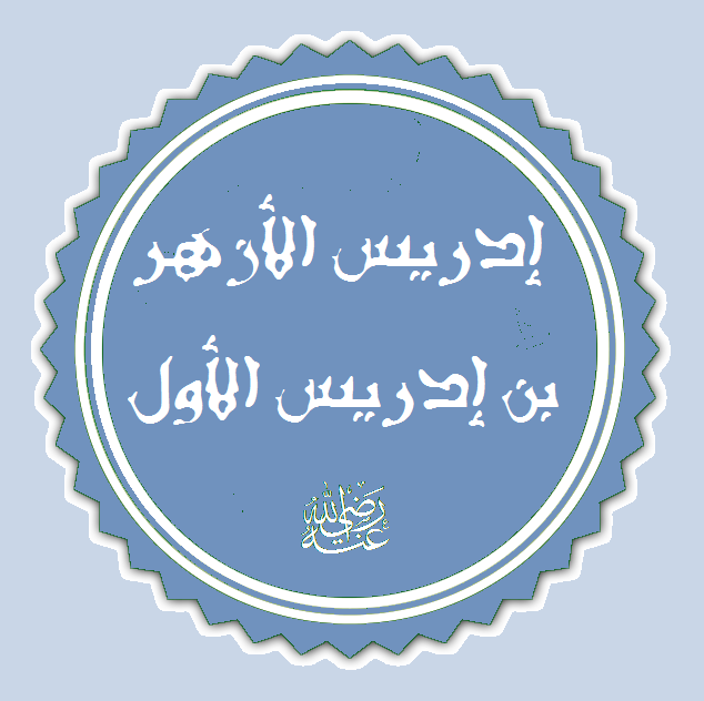 تخطيط لإسم إدريس الثاني